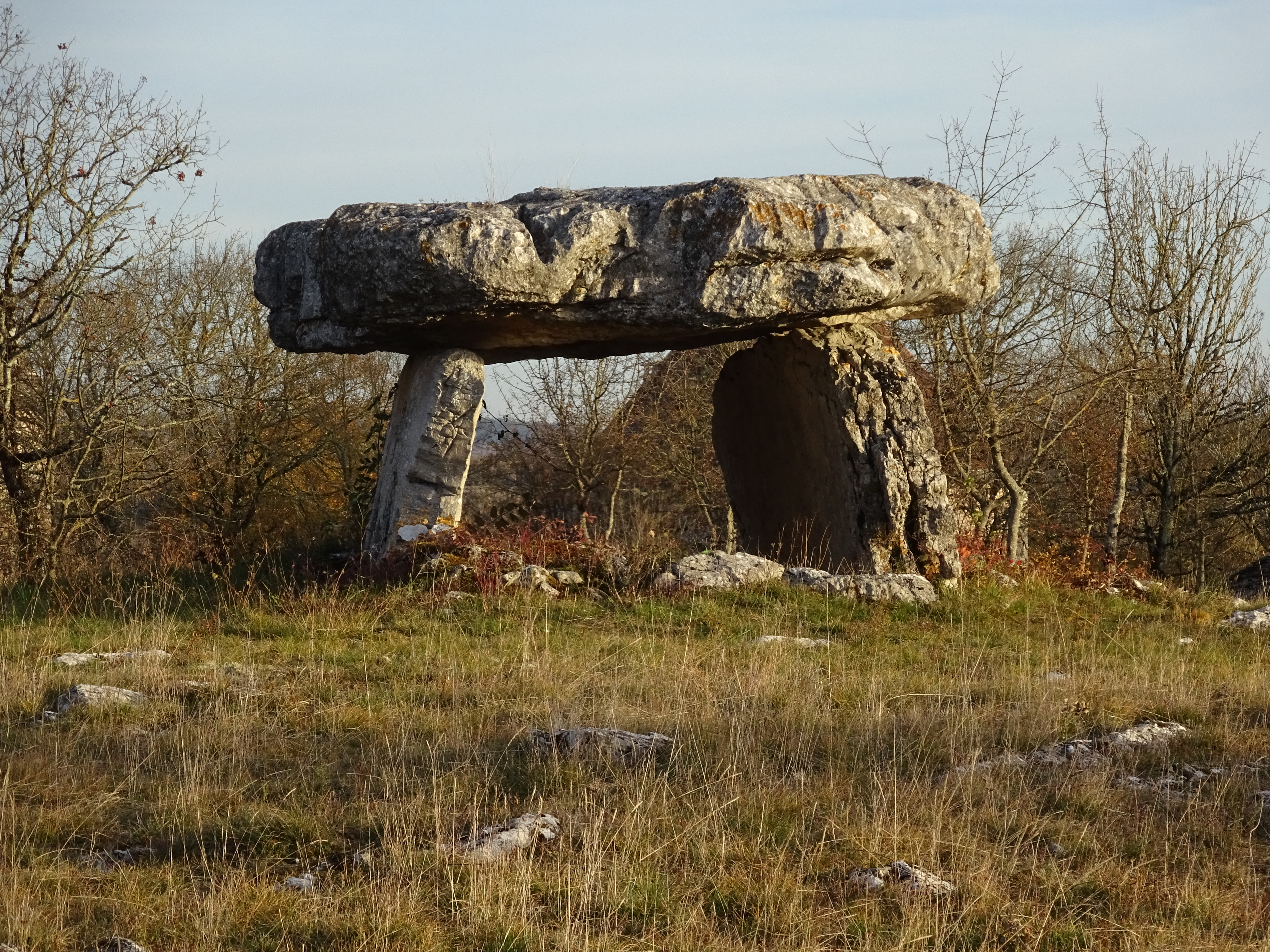 Dolmen du Mas de l'Artillou à Espédaillac (Lot, France)